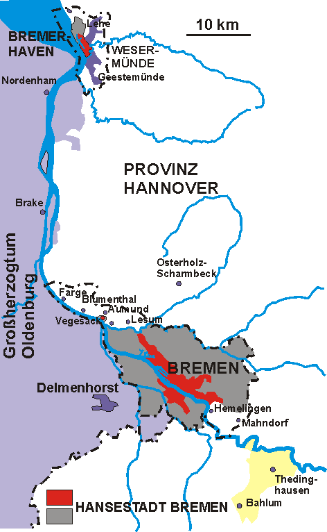 Karte der Hansestadt Bremen 1930. mit heutigen Grenzlinien